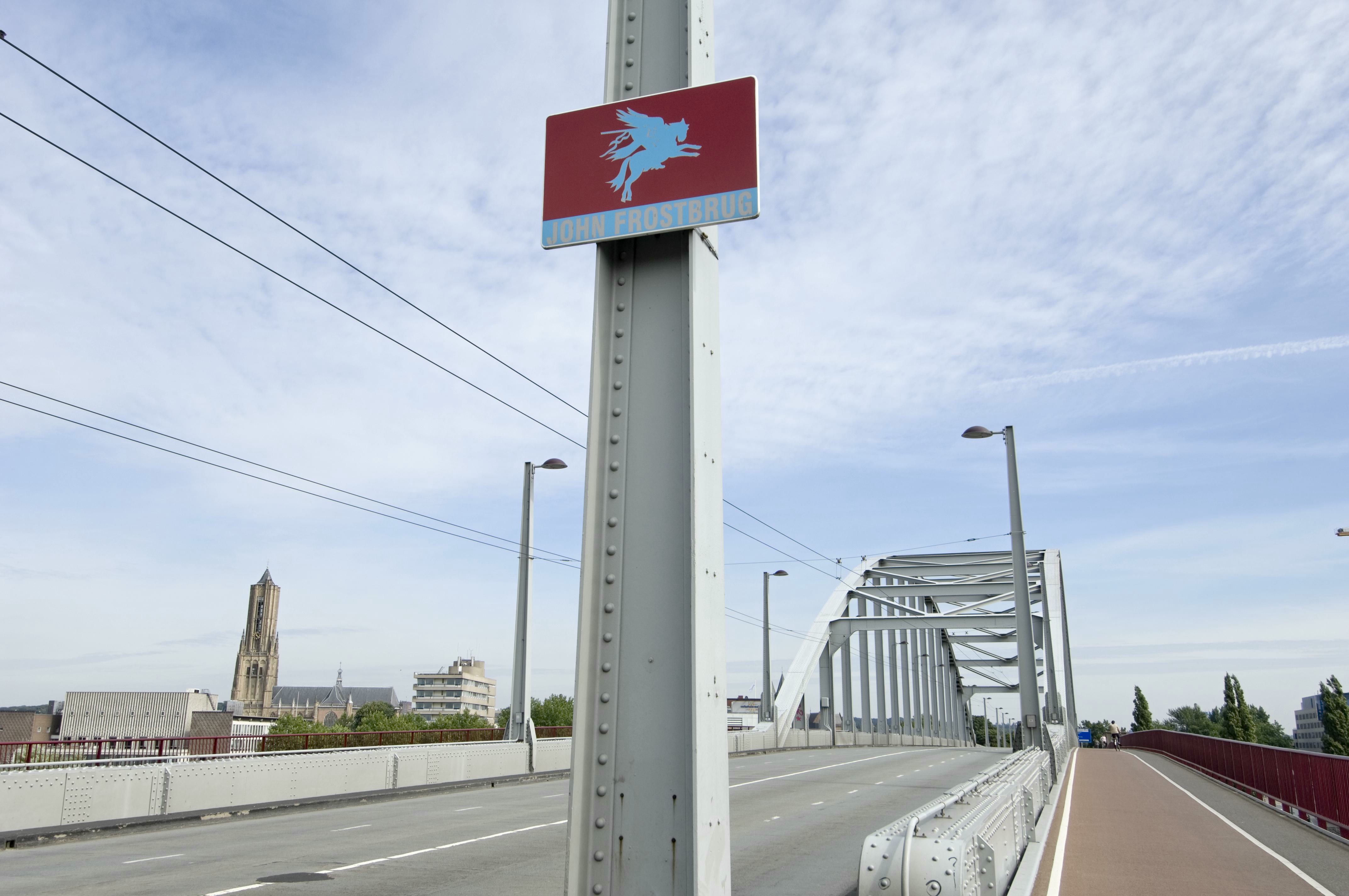 John Frostbrug: Overzicht op de Johan Frostbrug met naambord op constructiepaal (opmerking: Gefotografeerd voor Monumenten van Herrezen Nederland)